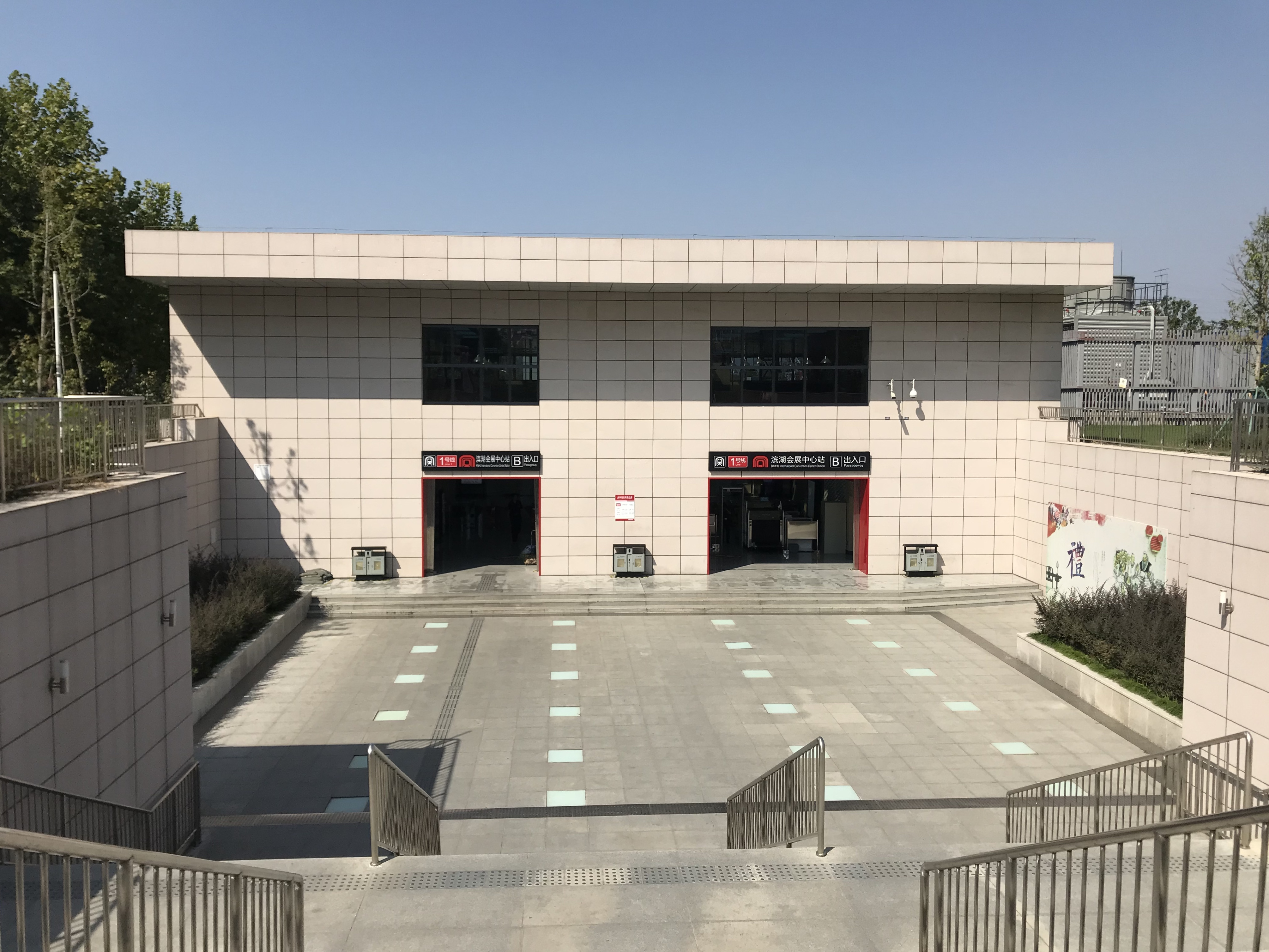 浜湖会展センター駅の2番出入り口